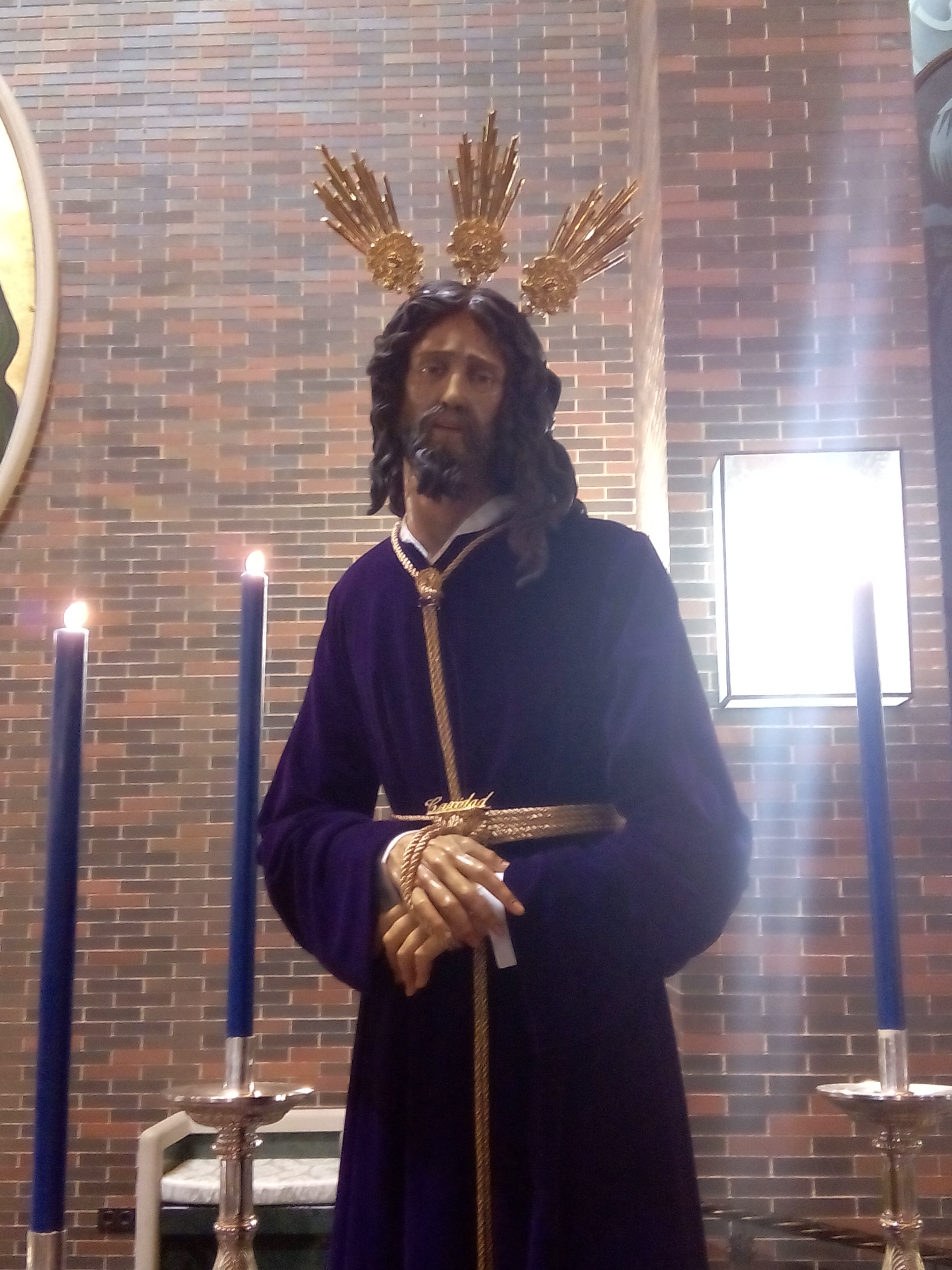 Imagen de Jesús de la Caridad de Jaén.